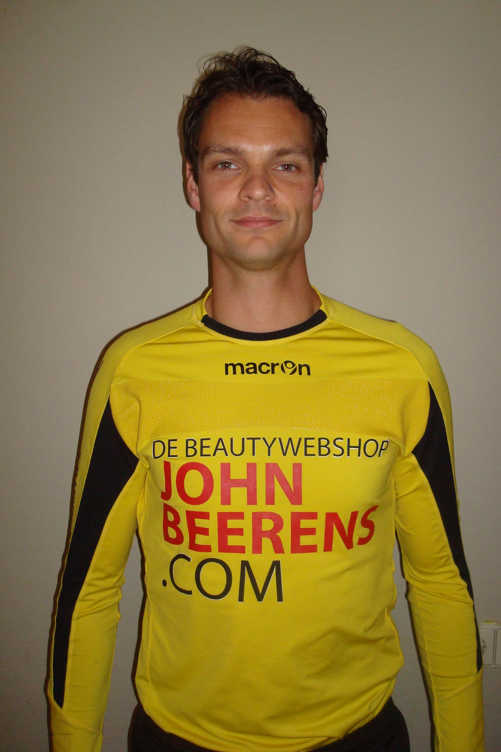 David Meul in het shirt van Willem II seizoen 2013/2014